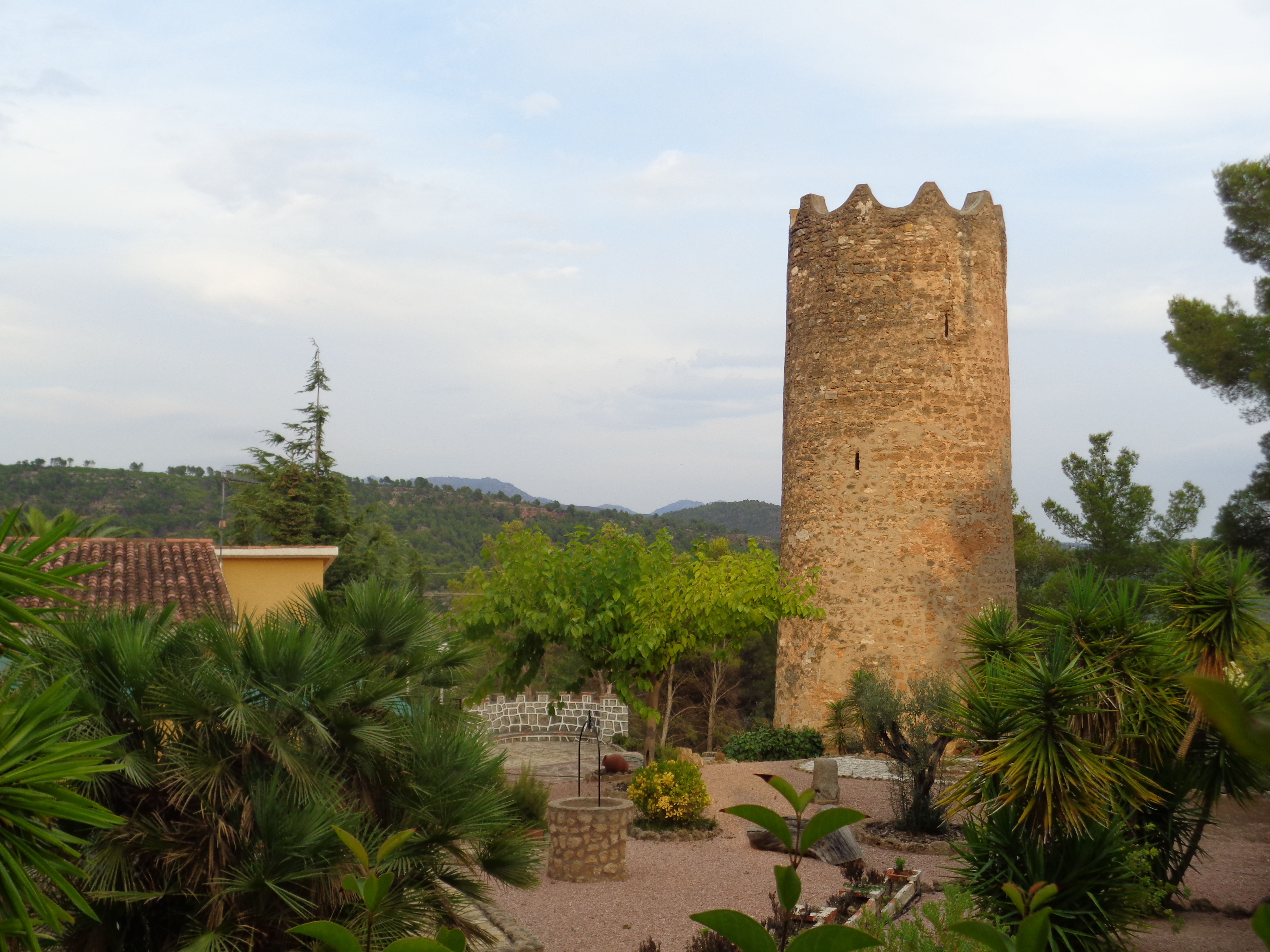 Torre d'Altomira 07.081-002.